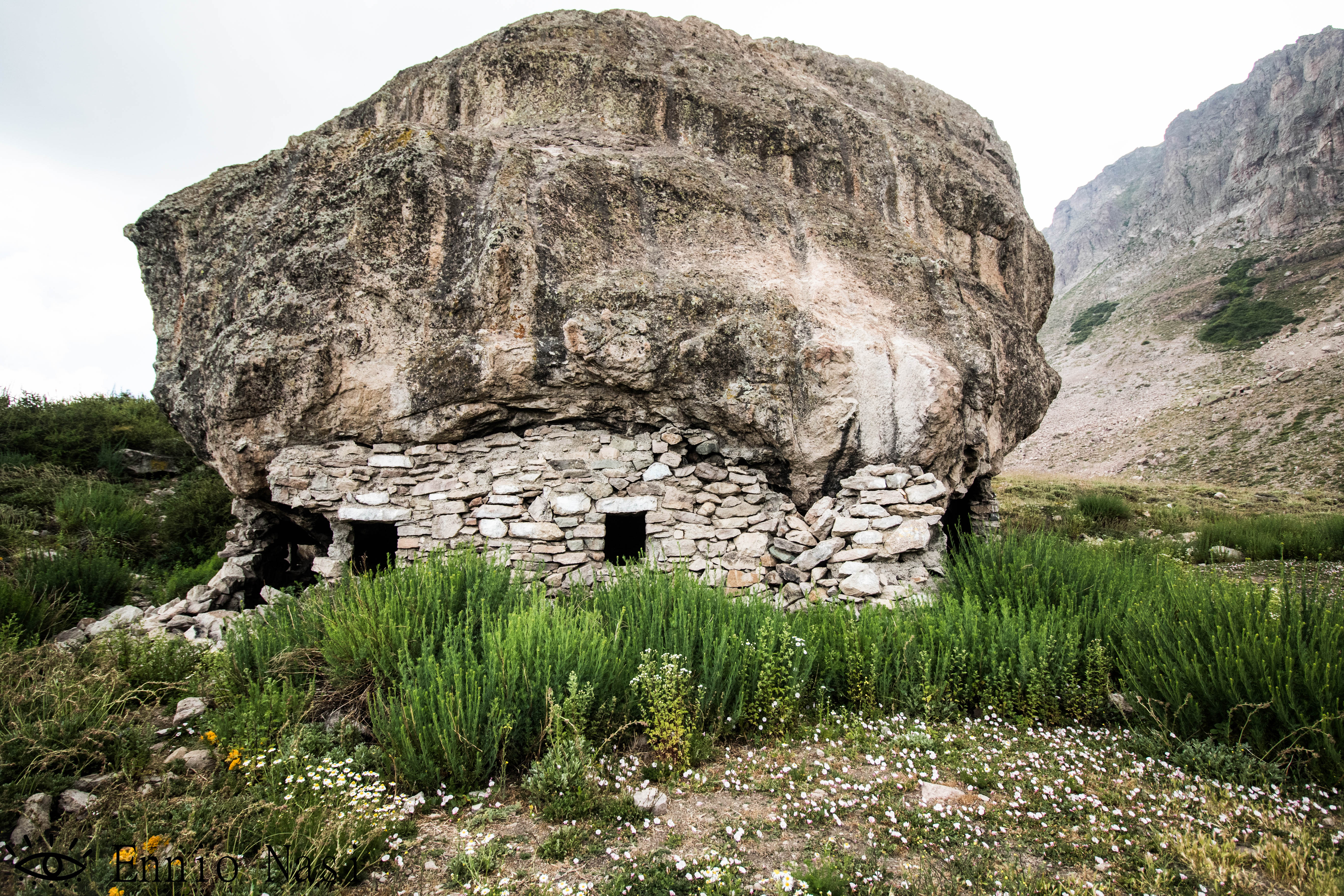 Refugio de piedra usado hace años por arrieros, de aparente origen Aconcagua, Camino Valle Nevado, Región metropolitana, Chile.